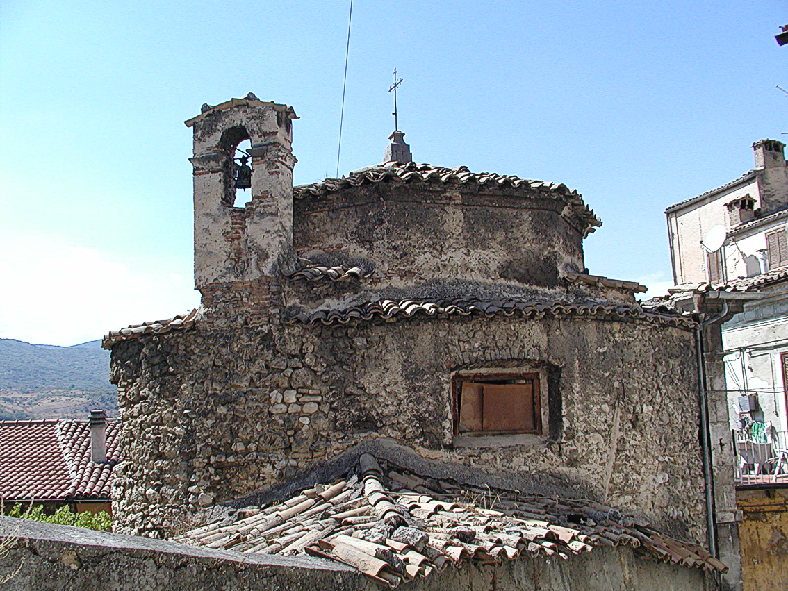 Chiesetta dell'Addolorata